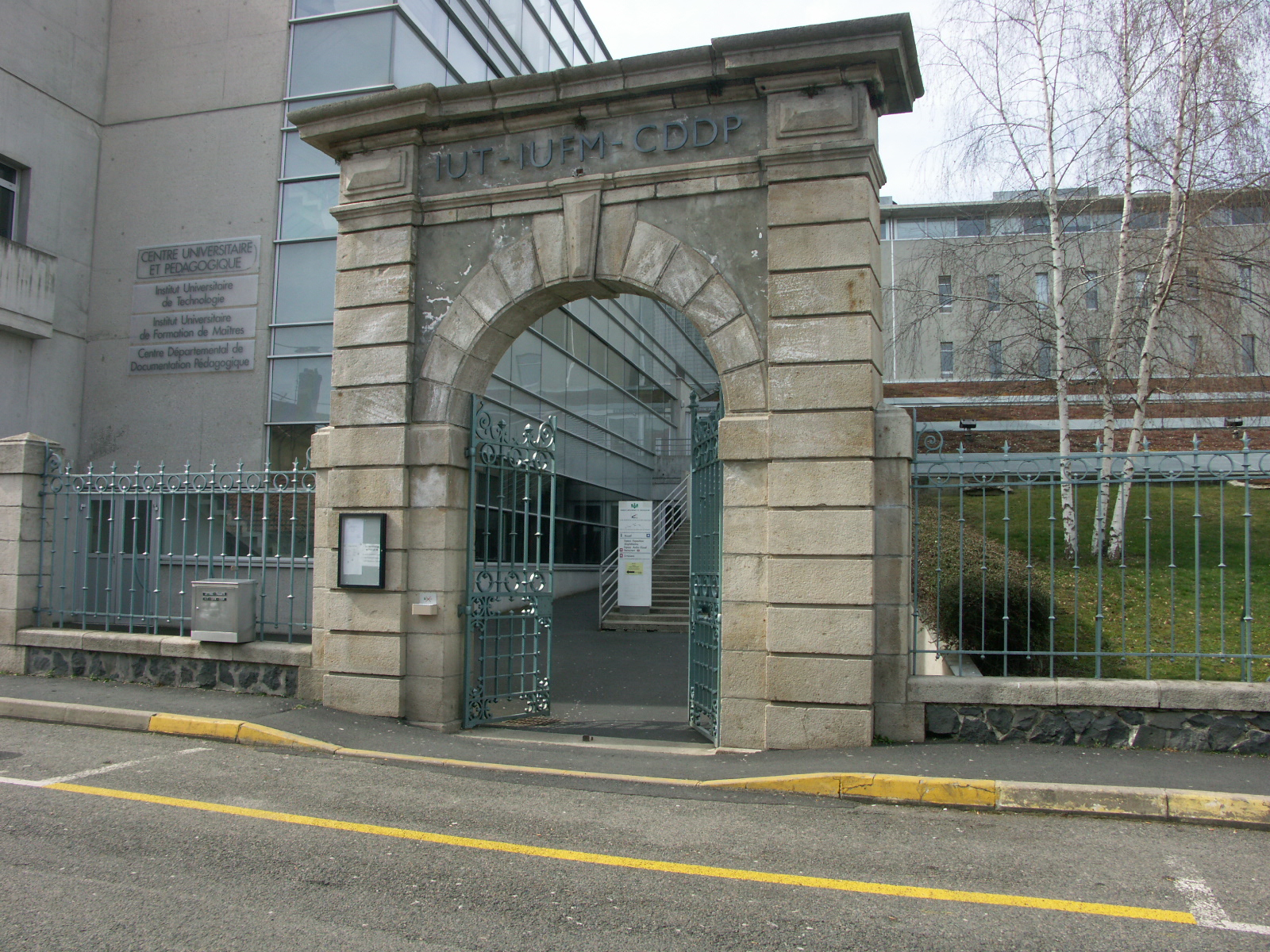 bâtiment antenne iufm le puy